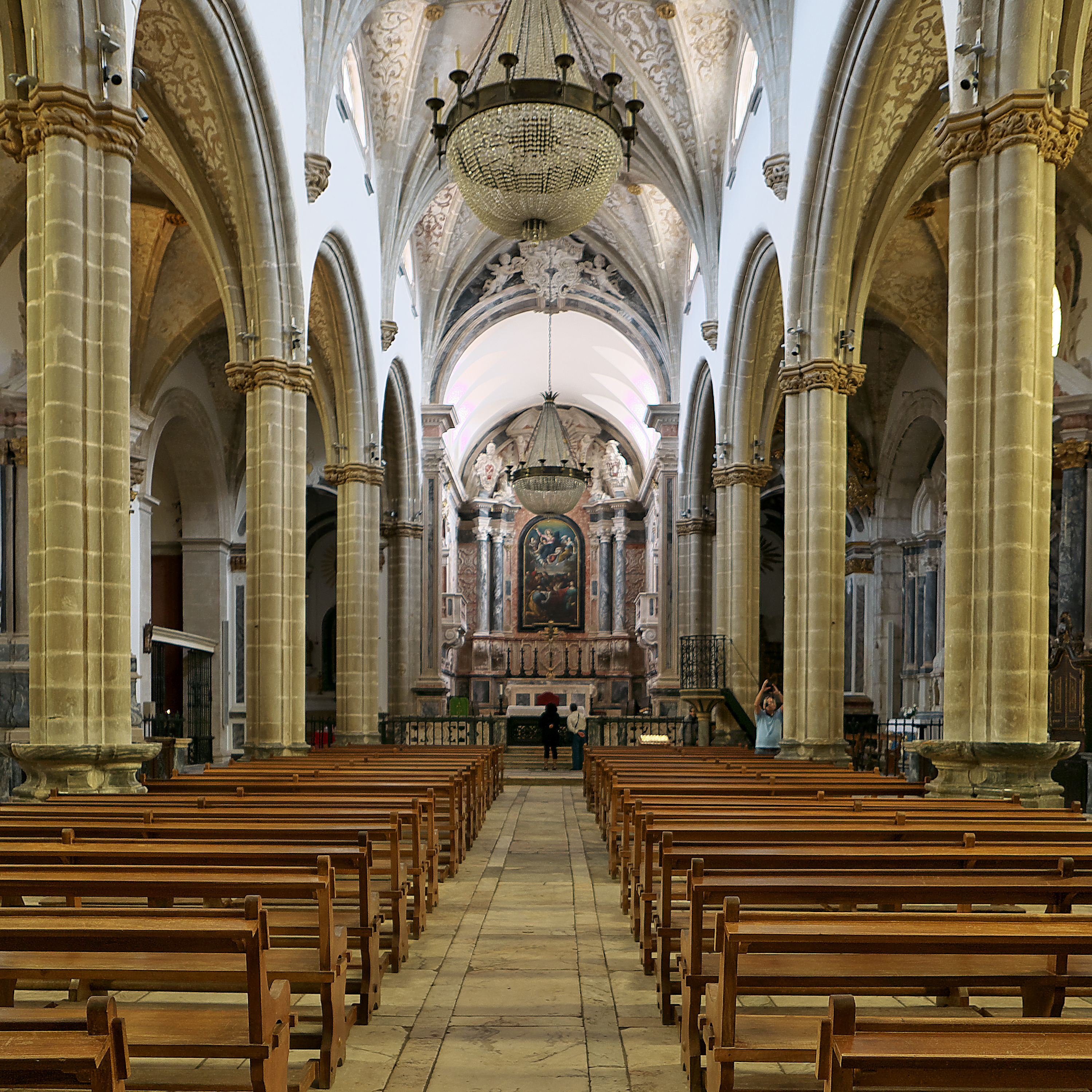 Nave central de la iglesia trazada por Francisco de Arruda (1517-1537)